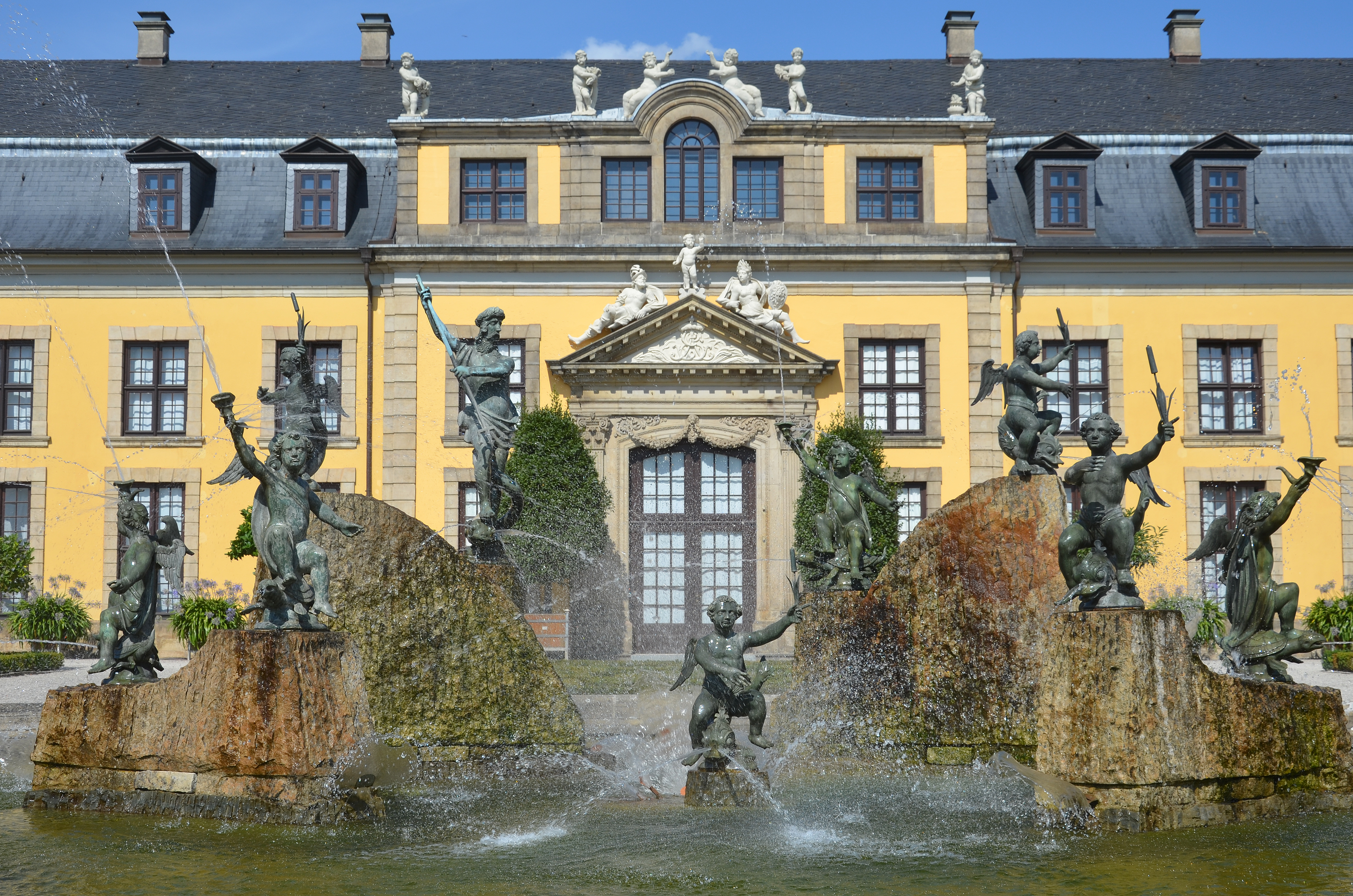 Während der 7. Hannoverschen Freiwilligenbörse am 28. August 2016 im Galeriegebäude im Großen Garten von Hannover entstand in Kooperation des Freundeskreis Hannover mit dem Wikipedia-Büro Hannover diese Aufnahme des 2008 umgestalteten Neptunbrunnens ...